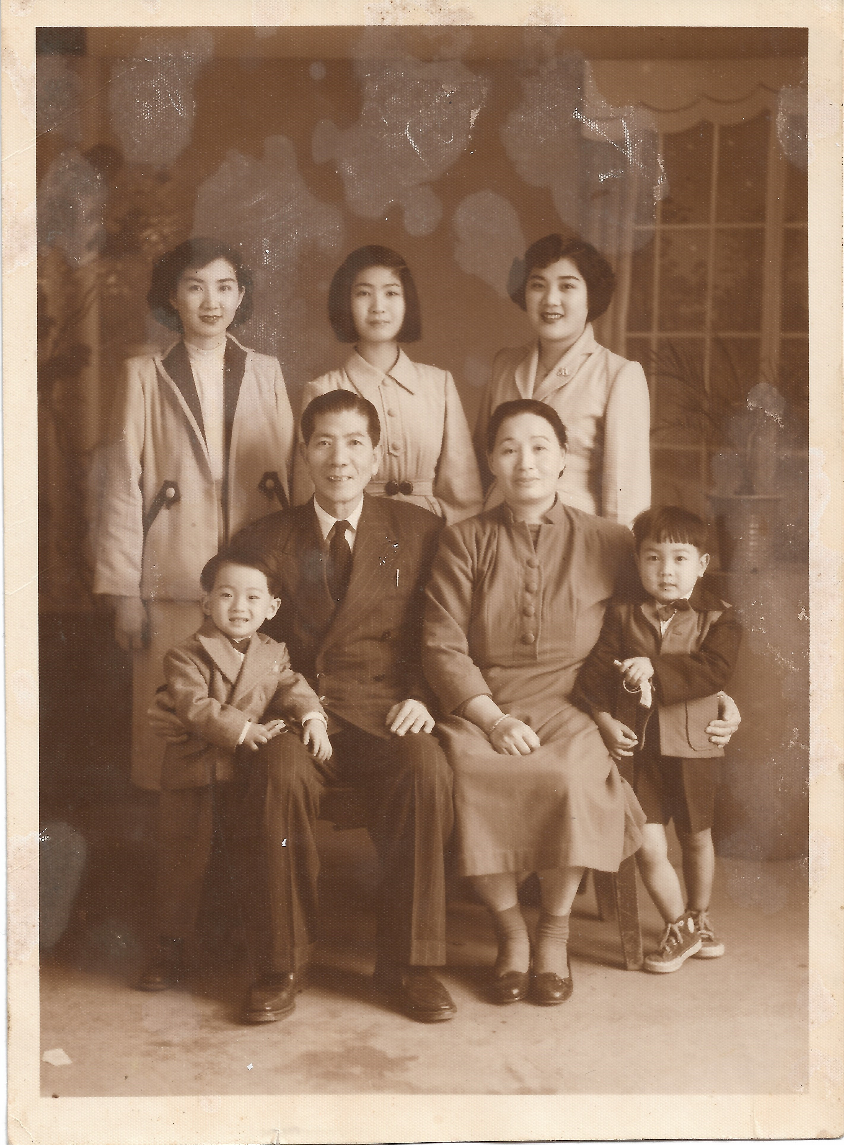 陳爐與陳林綉美全家福照，後為三名女兒，左自右為：陳金鳳（弘子）、陳錦鳳（民子）、陳玉鳳（史子）。